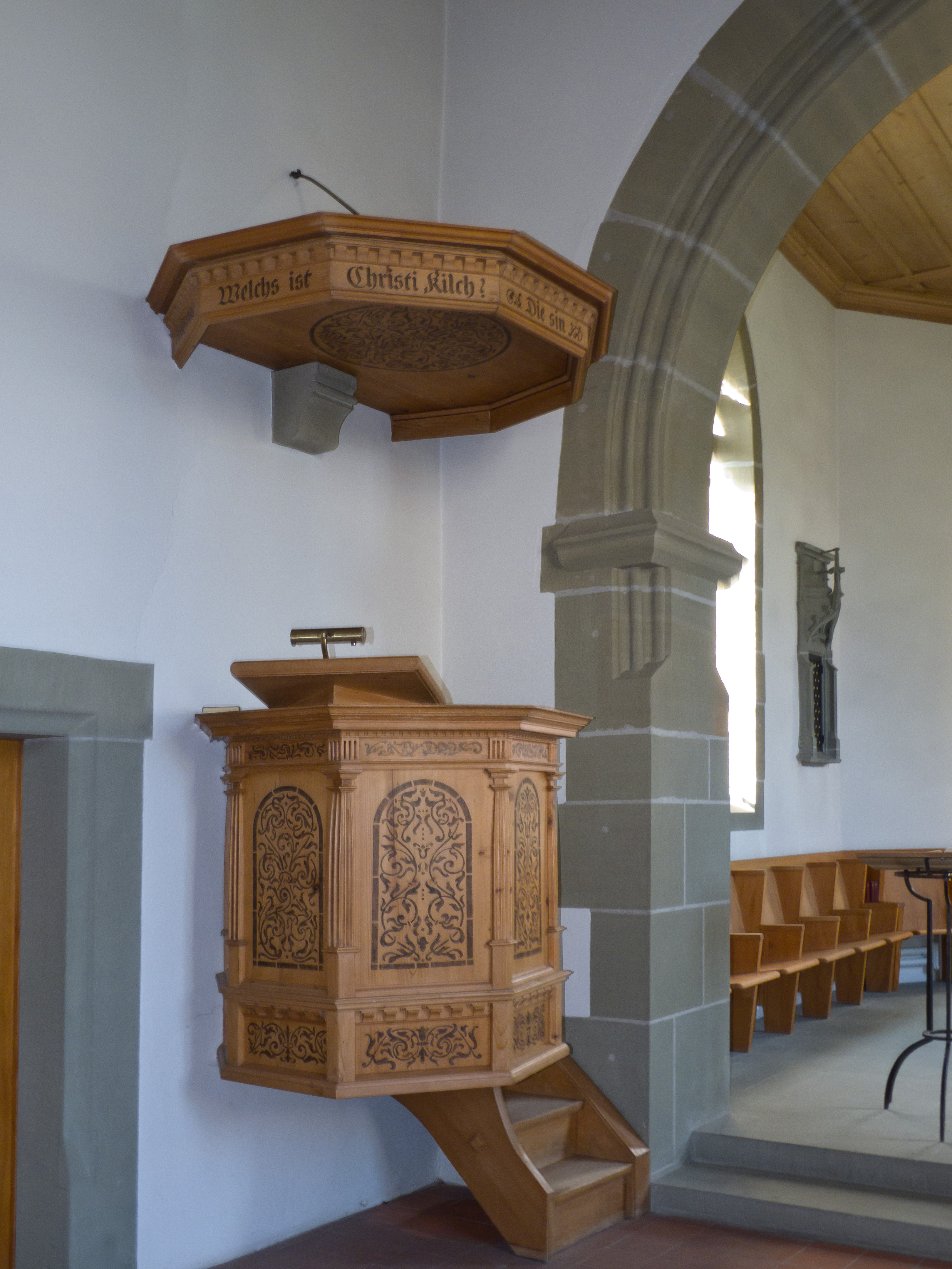 Ref. Kirche Moosseedorf, Kanzel